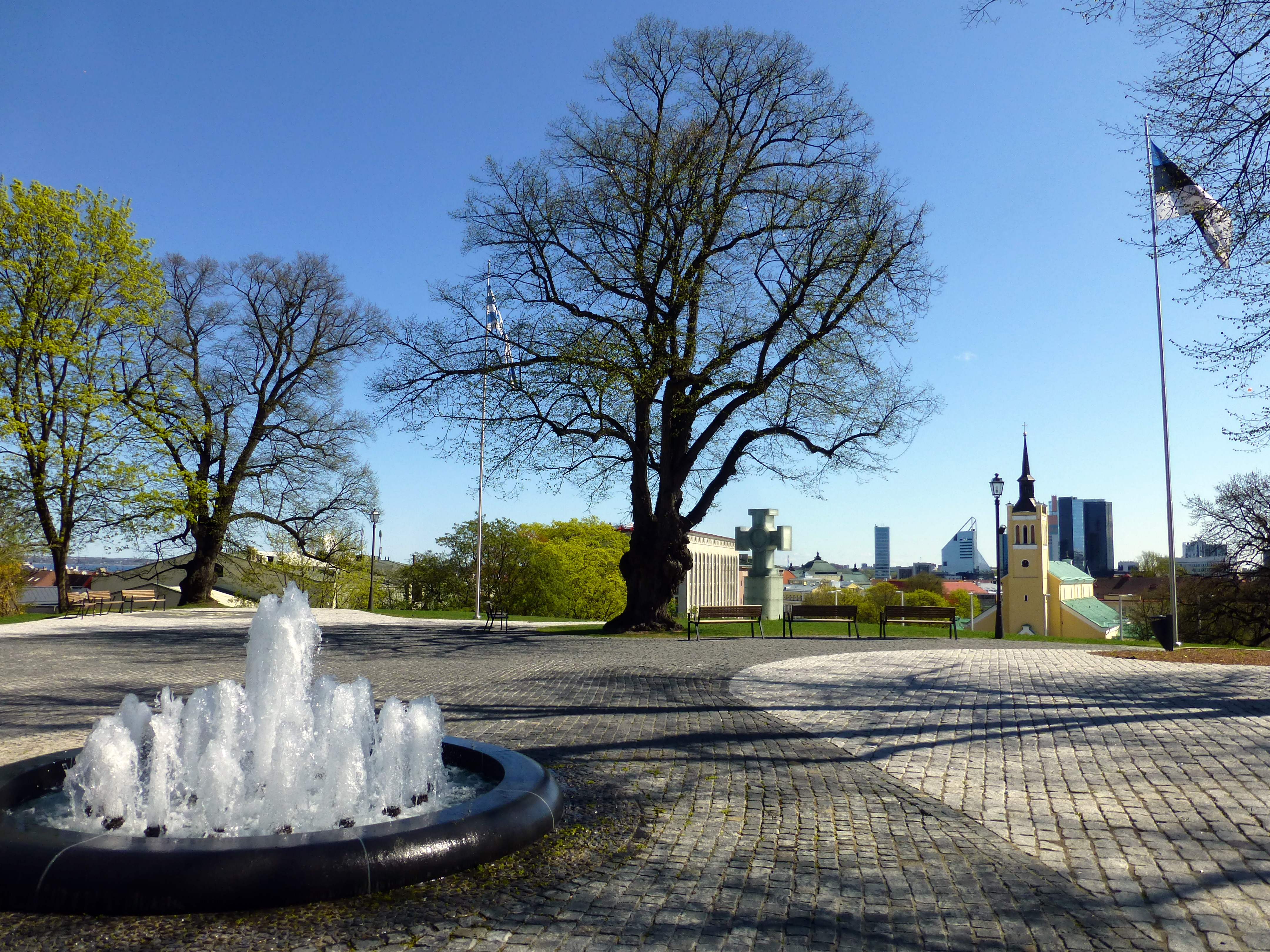 Harjumägi